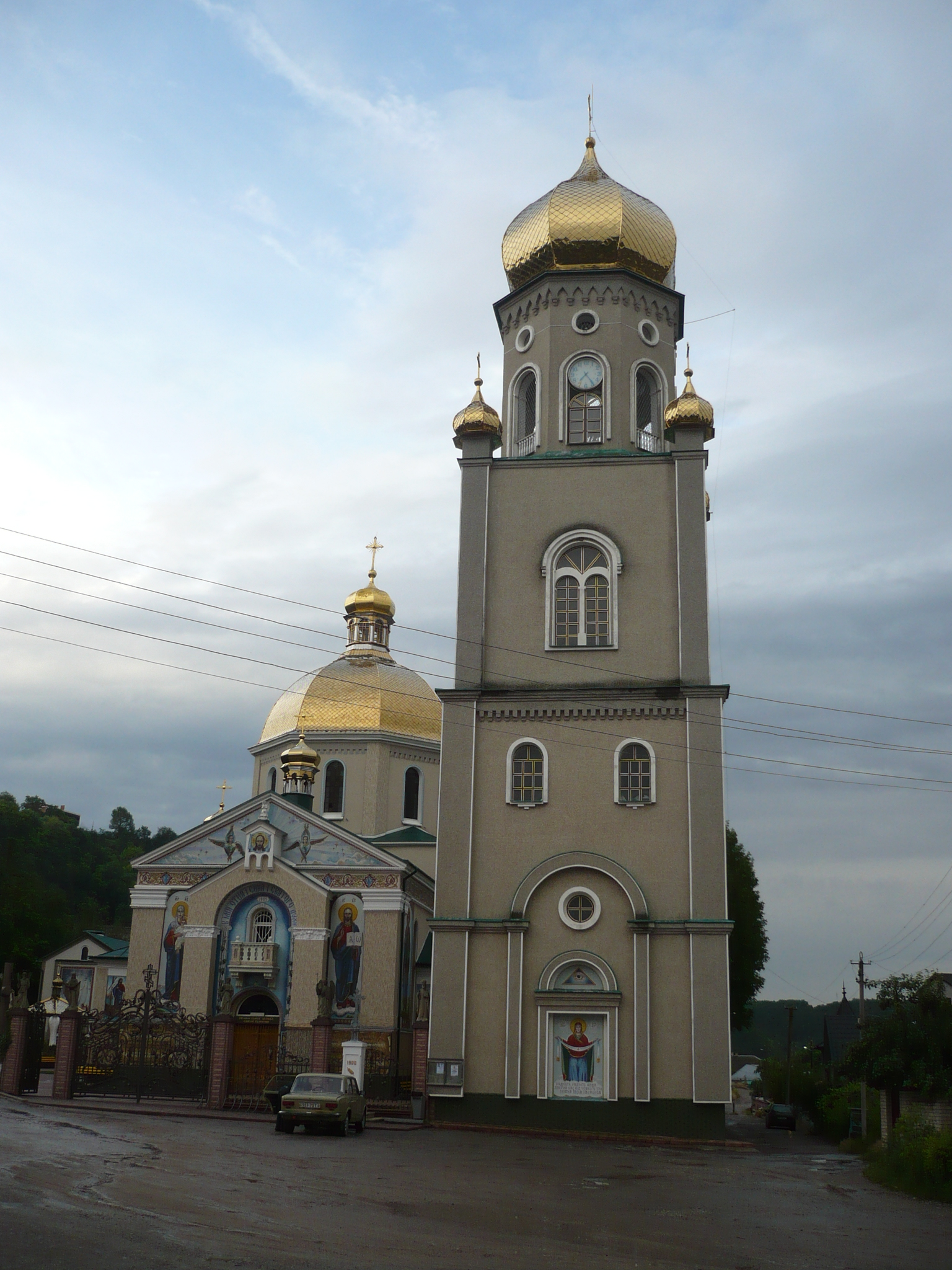 Czortków. Cerkiew Zaśnięcia